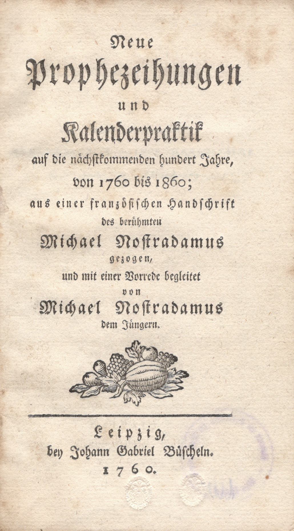 Gottfried Christian Freiesleben: Neue Prophezeihungen und Kalenderpraktik auf die nächstkommenden hundert Jahre. Büschel, Leipzig 1760